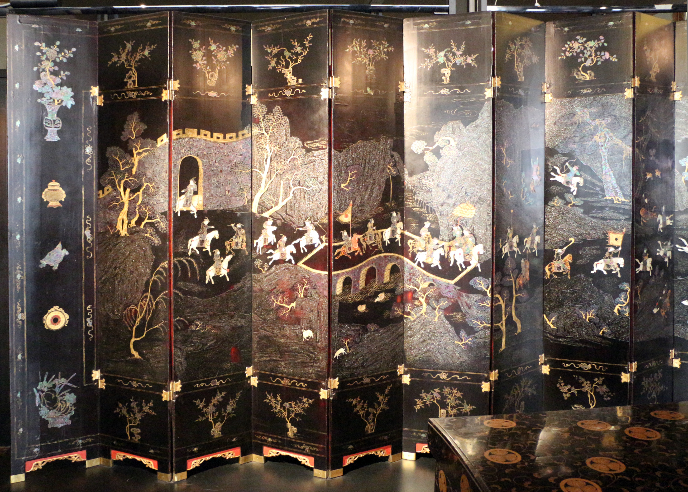 Museo d'Arte Orientale This is a photo of a monument which is part of cultural heritage of Italy.